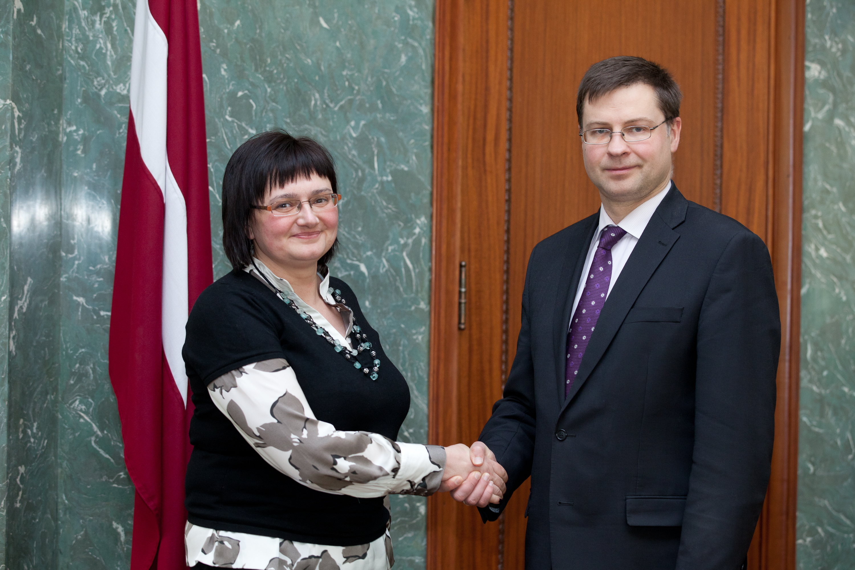 Foto: Toms Norde, Valsts kanceleja